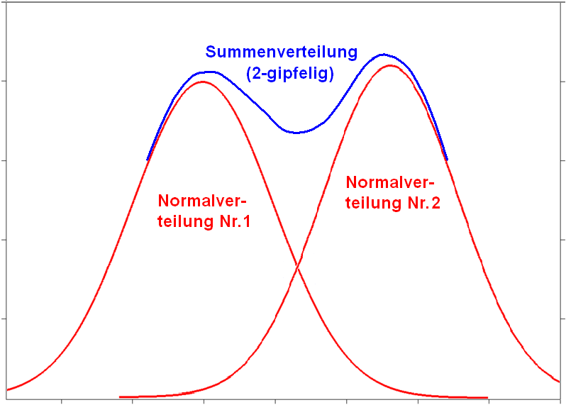 Zweigipfelige Häufigkeitsverteilung, entstanden aus der Überlagerung zweier Normalverteilungen